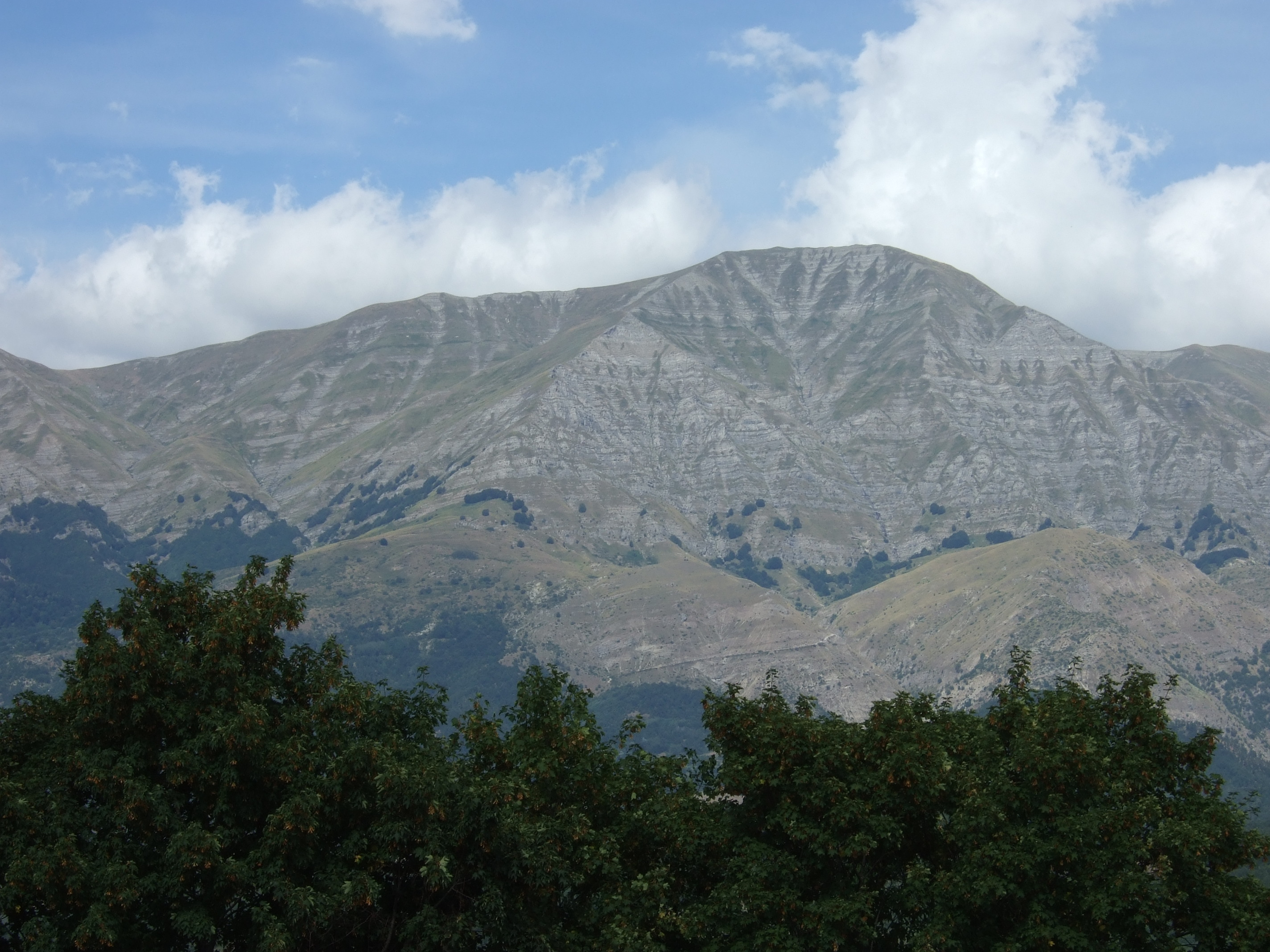 Monte Gorzano, Italy. Versante Ovest